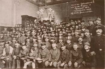 Jewish and German Soldiers Prayer in Yom Kippur, WW1, Brussels 1915